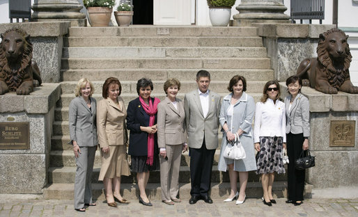 Partnerprogramm; die Ehepartner der Teilnehmer des G8-Gipfels in Heiligendamm besuchen am 7. Juni 2007 Burg Schlitz in Hohen Demzin. Von links nach rechts: Stephen Harpers Ehefrau Laureen, Ljudmila Putina, Romano Prodis Ehefrau Flavia, Laura Bush, Merkels Ehemann Joachim Sauer, Cherie Blair, José Manuel Barrosos Frau Margarida Sousa Uva und Shinzō Abes Gattin Akie.